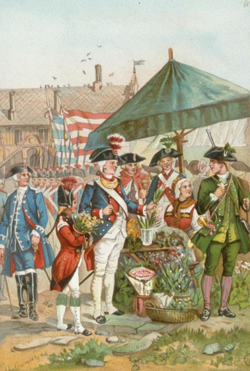 République de Mulhouse. Bibliothèque nationale et universitaire de Strasbourg